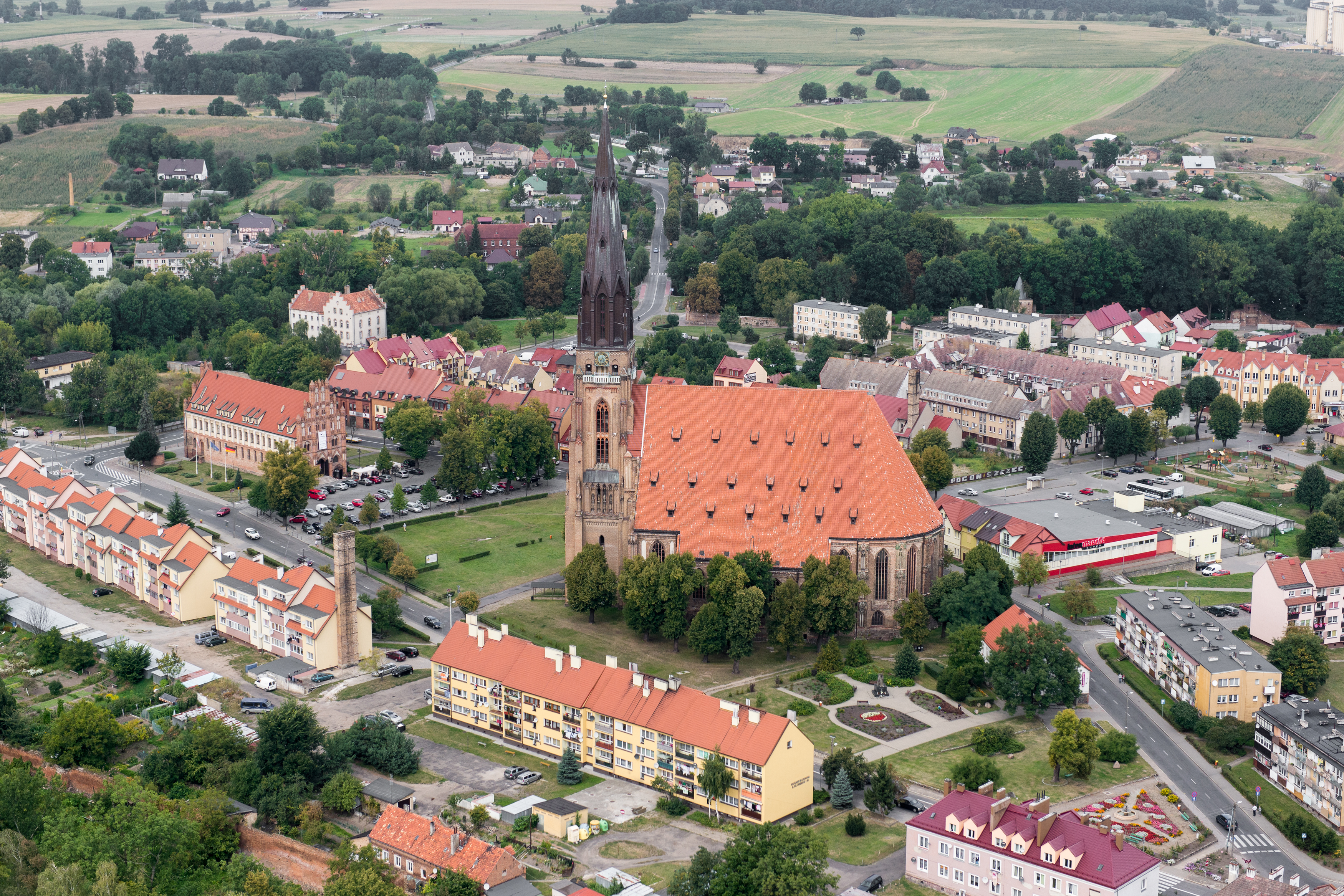 Chojna, kościół Mariacki, XIII, XV, 2 poł. XIX